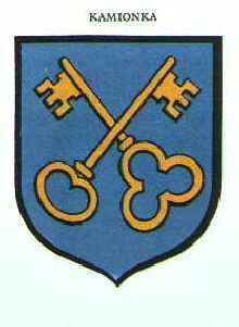 Herb wsi Kamionka (powiat lubartowski).